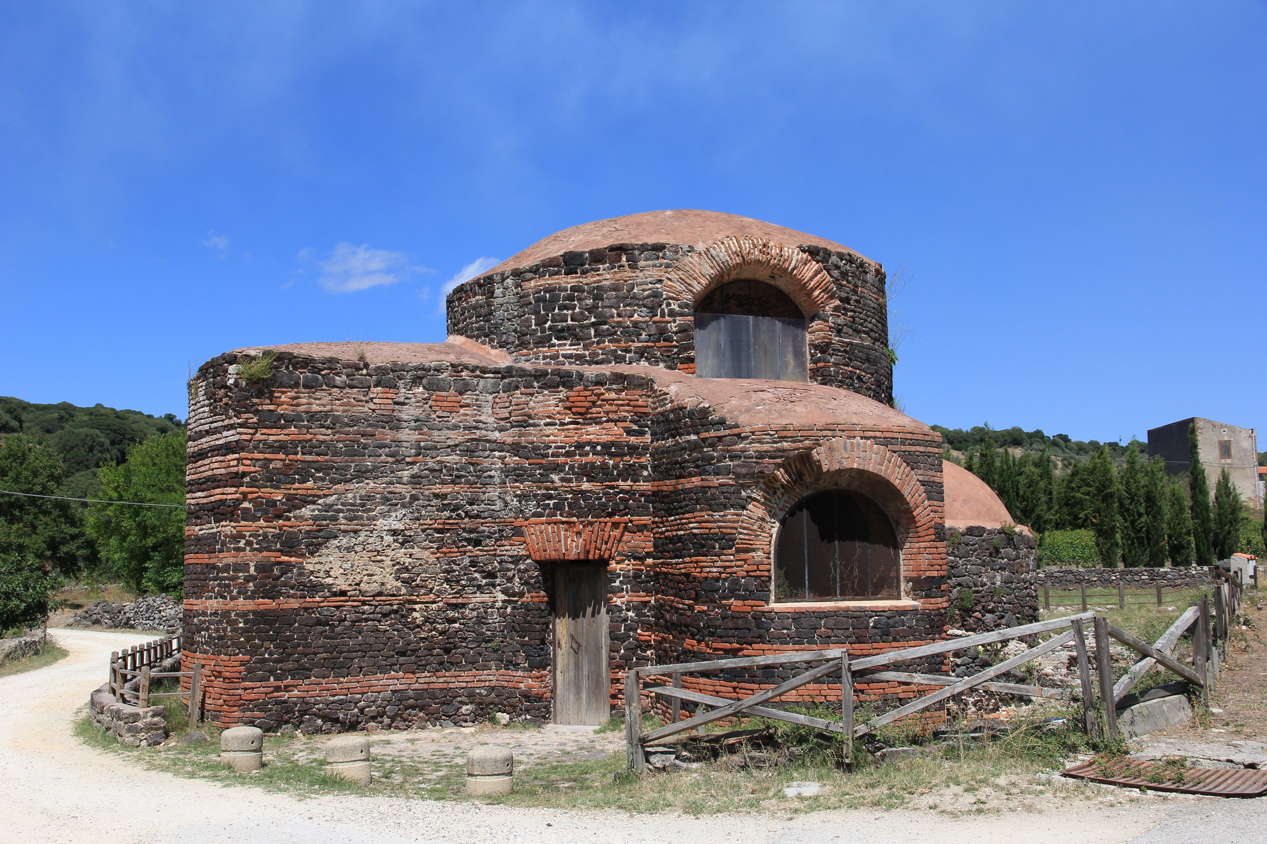 Chiesa di Santa Maria di Mesumundu